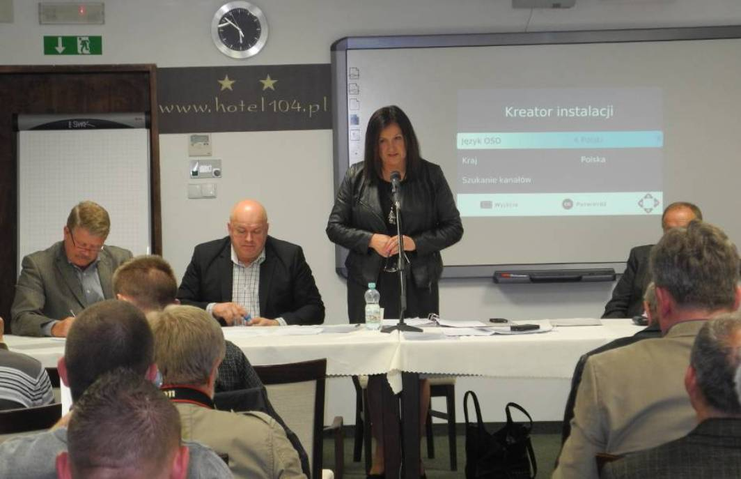 Stargard, 04.05.2014r. Beata Radziszewska nowym prezesem Spójni Stargard